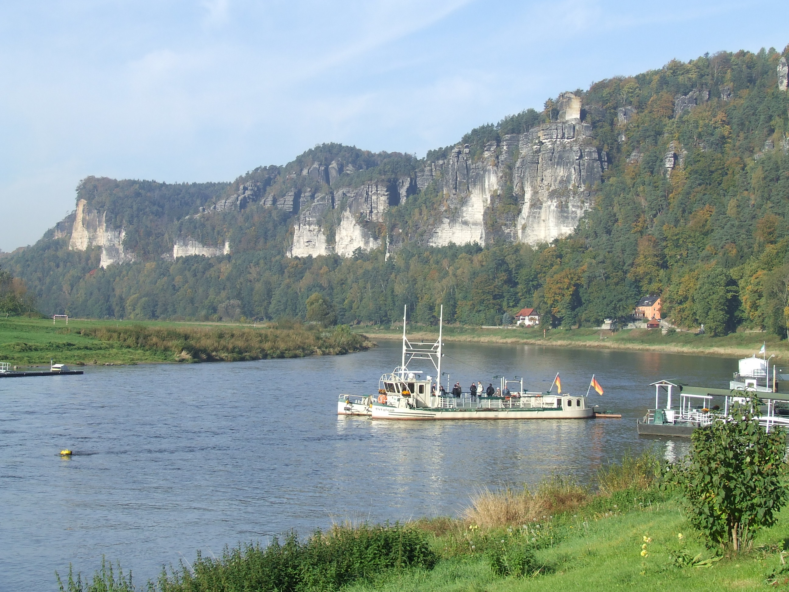 Die Elbe bei Rathen mit der Rathener Gierseilfähre. Im Hintergrund das Steilufer der Bastei.